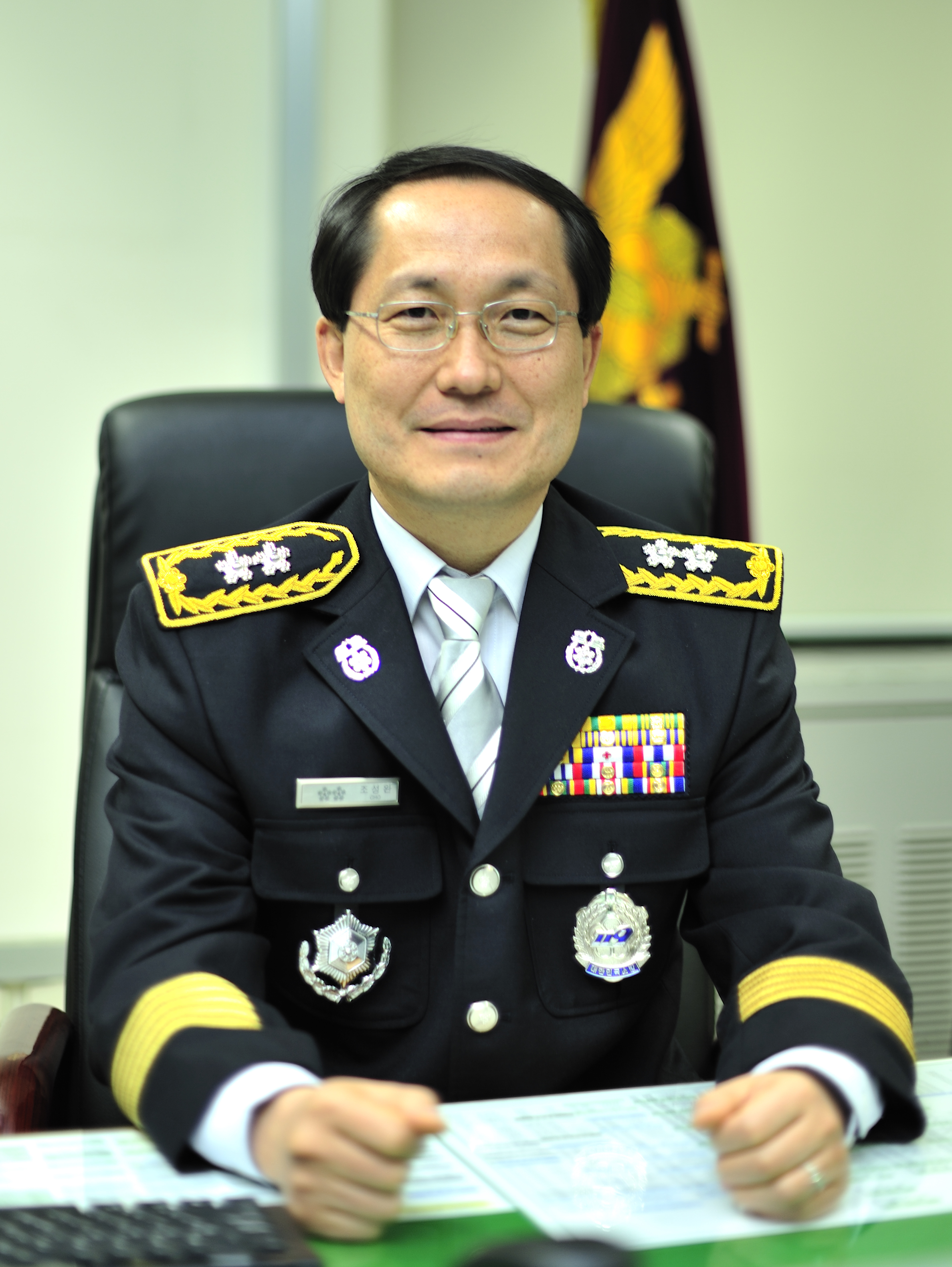 조성완 소방방재청 소방정책국장(2012년)